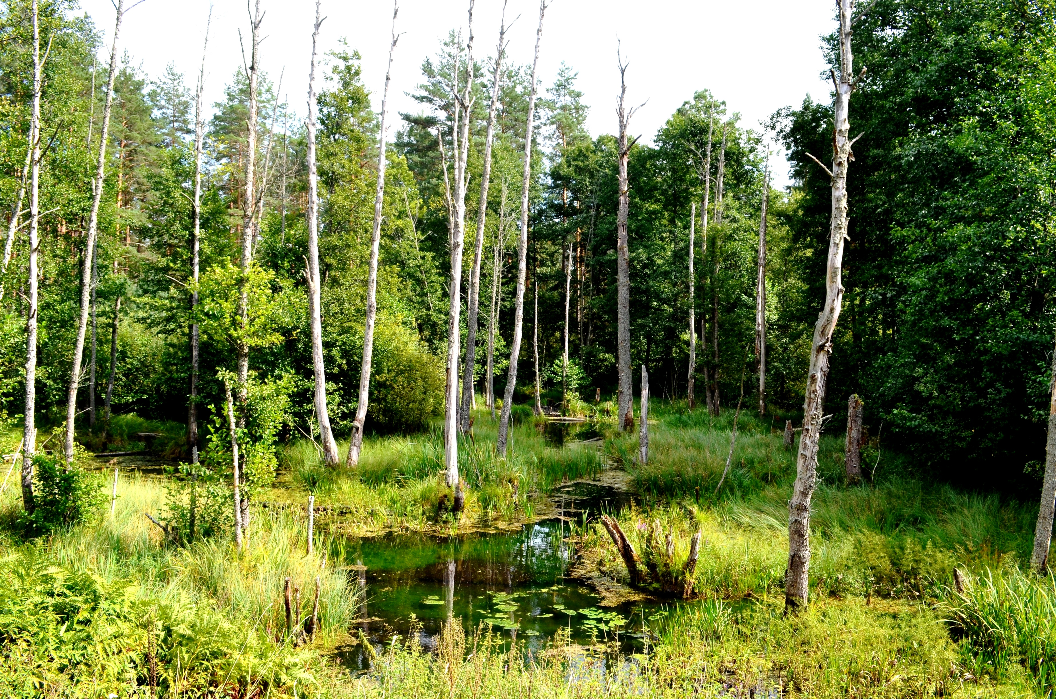 Pelkė miškuose pietvakariop nuo Marcinkonių, Varėnos r.